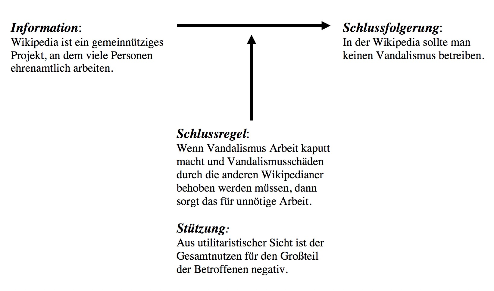 Beispiel für Toulmin-Schema